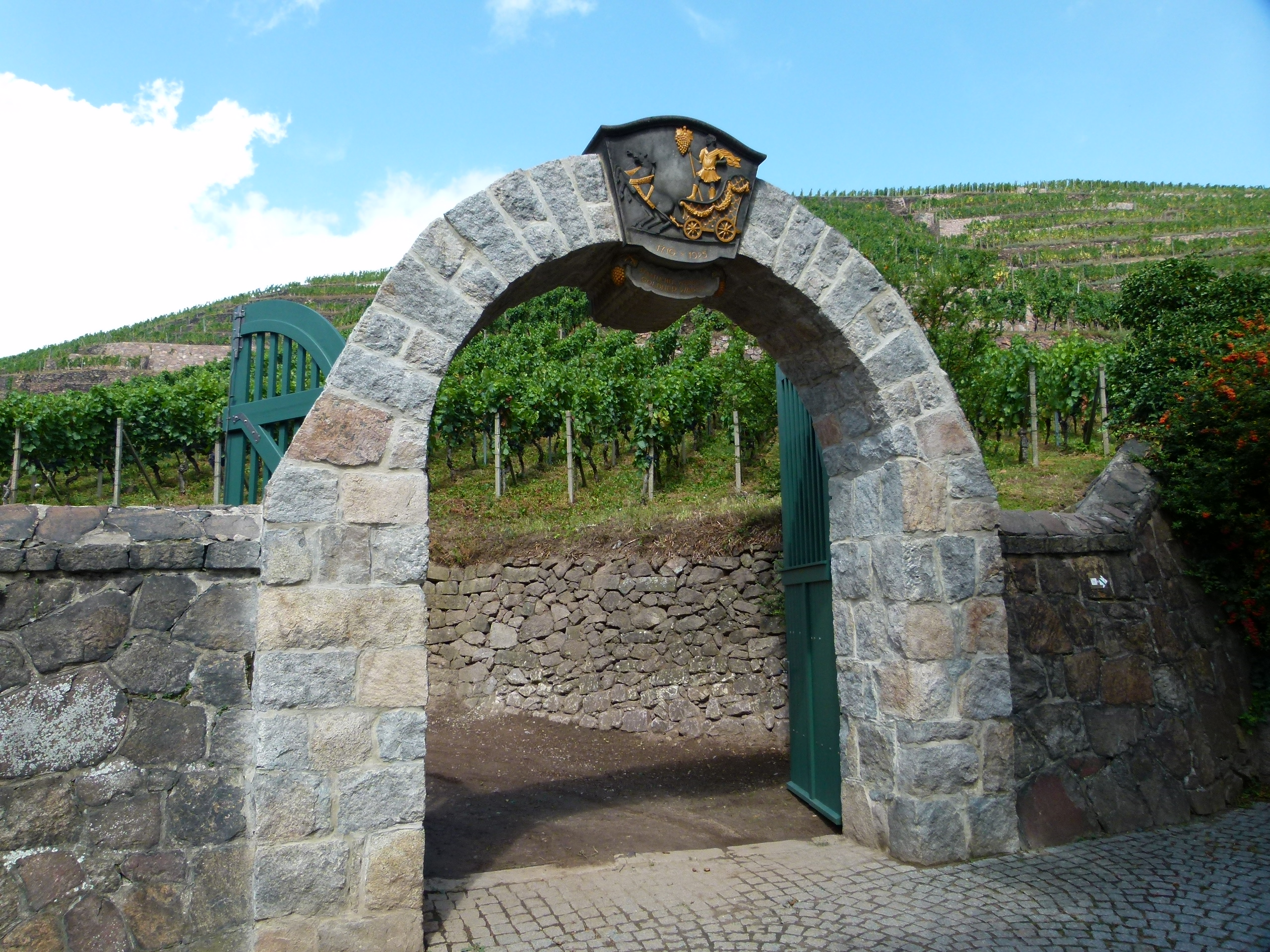 Denkmalgeschützter Torbogen, Am Goldenen Wagen, Radebeul